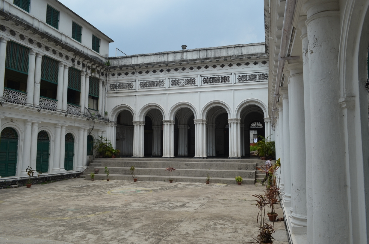 Tagore House, Calcutta